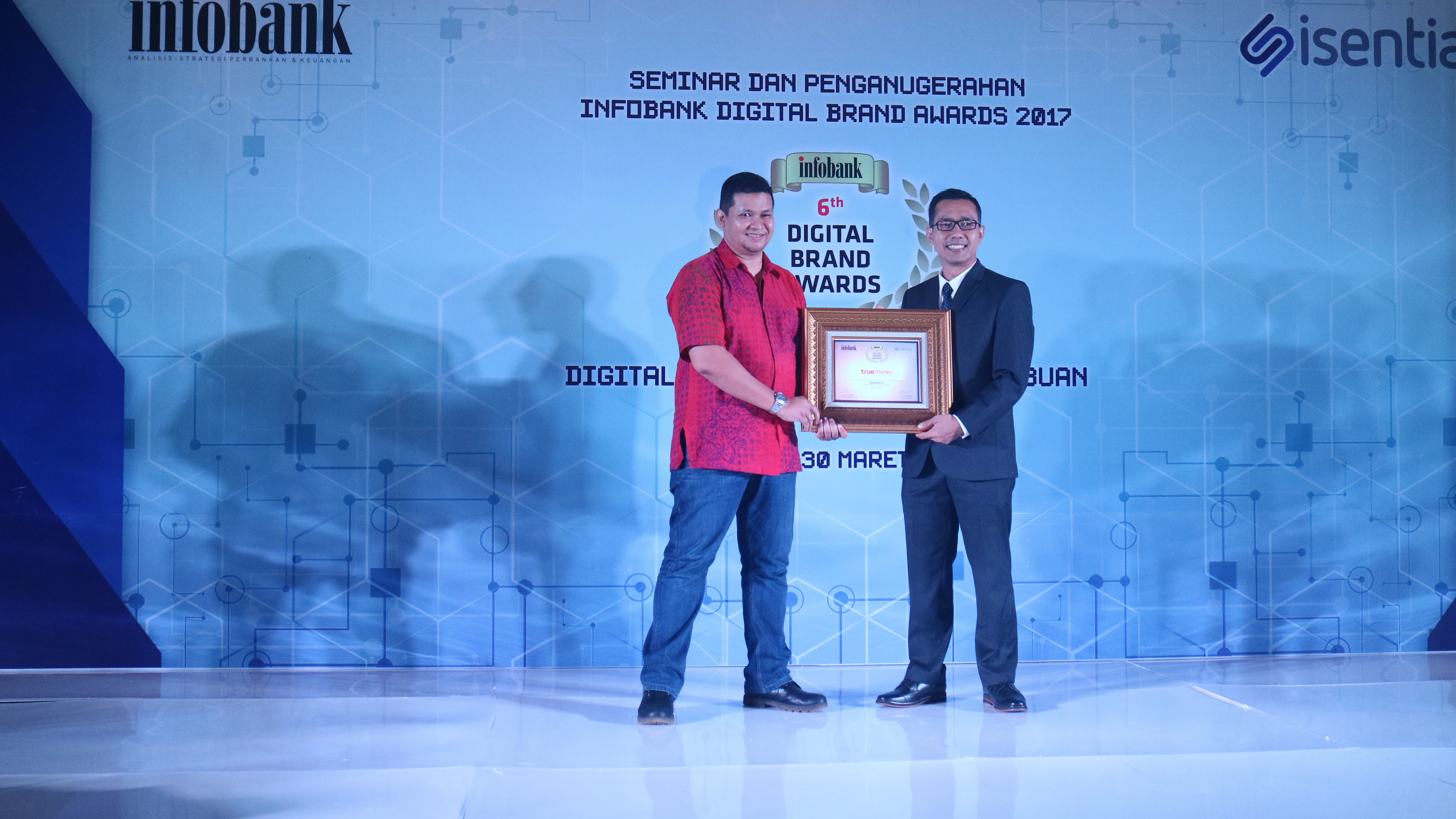 TrueMoney meraih peringkat ke tiga dalam kategori “Digital Brand Category E Money Financial Institutions Non-Bank”, dalam acara “6th Infobank Digital Brand of The Year 2017”.